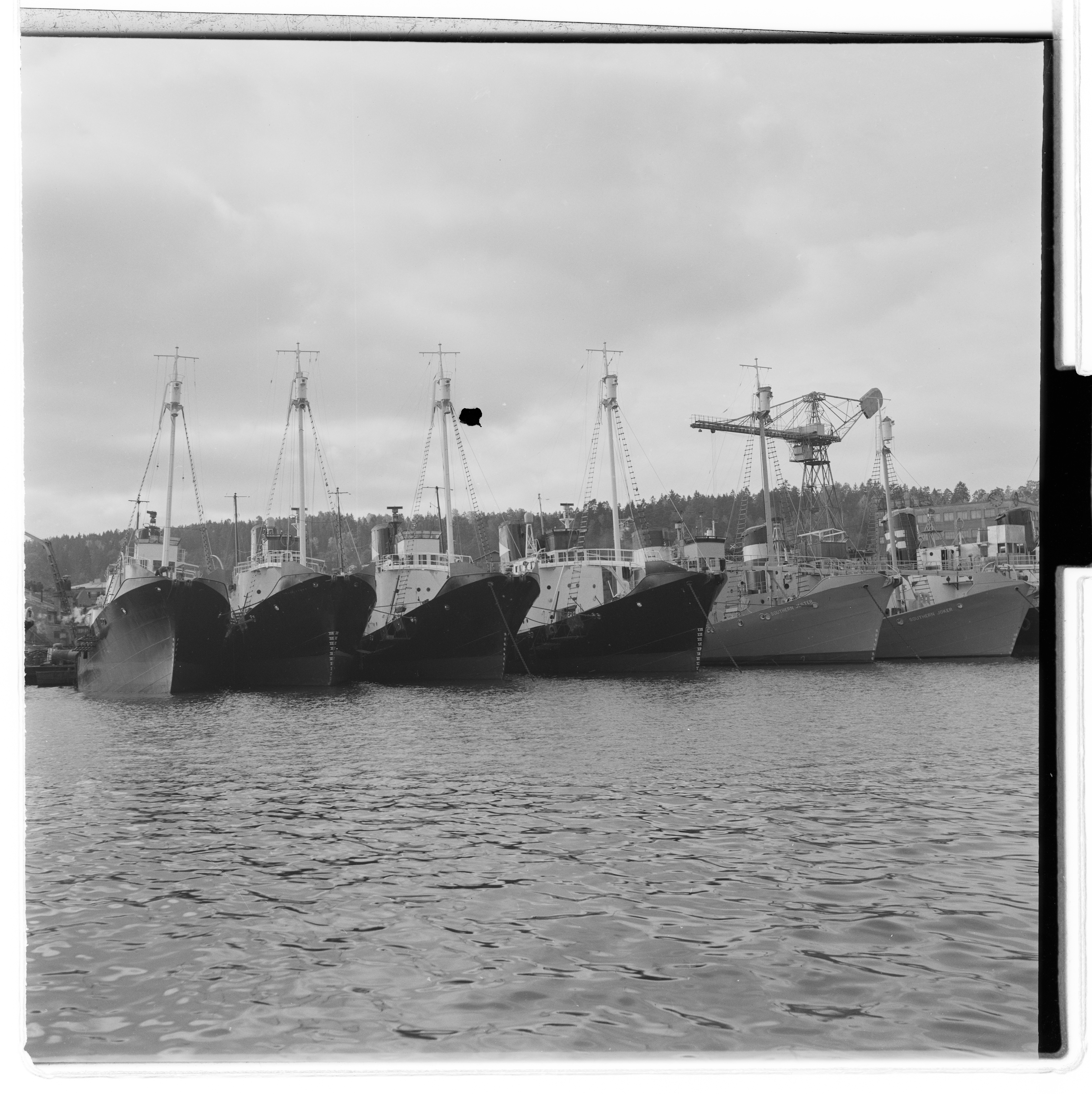 Bildet er hentet fra Arkivverket. Skip i Tønsberg. Arkivinstitusjon : Riksarkivet Arkivnavn : Billedbladet NÅ Sted : Norge, Vestfold, Tønsberg, Emneord: Skip, Båter Avbildet